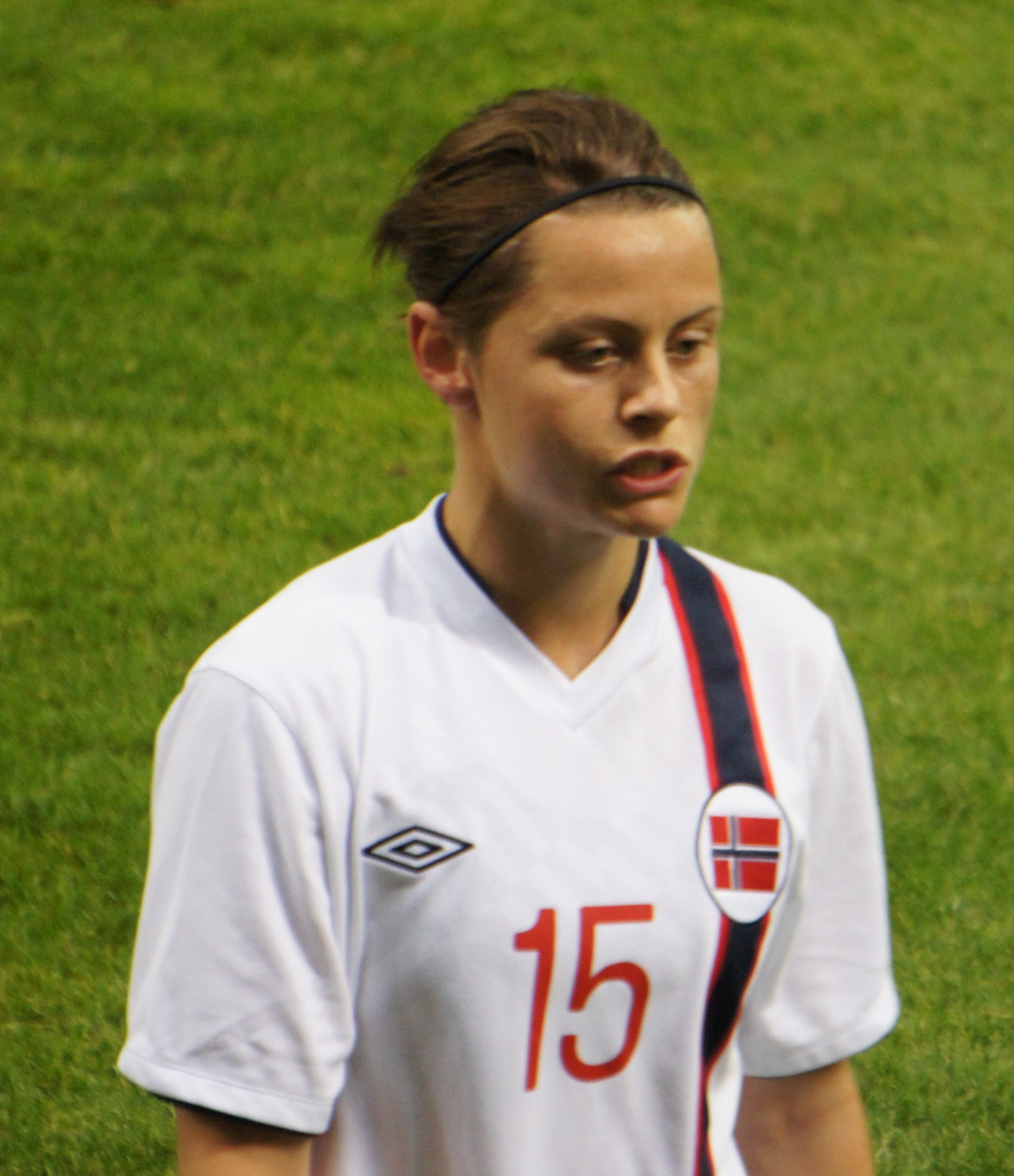 Nora Holstad Berge En équipe de Norvège.